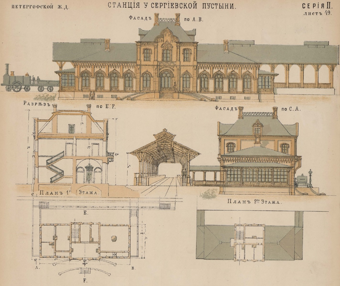 Станция Петергофской железной дороги у Сергиевской Пустыни